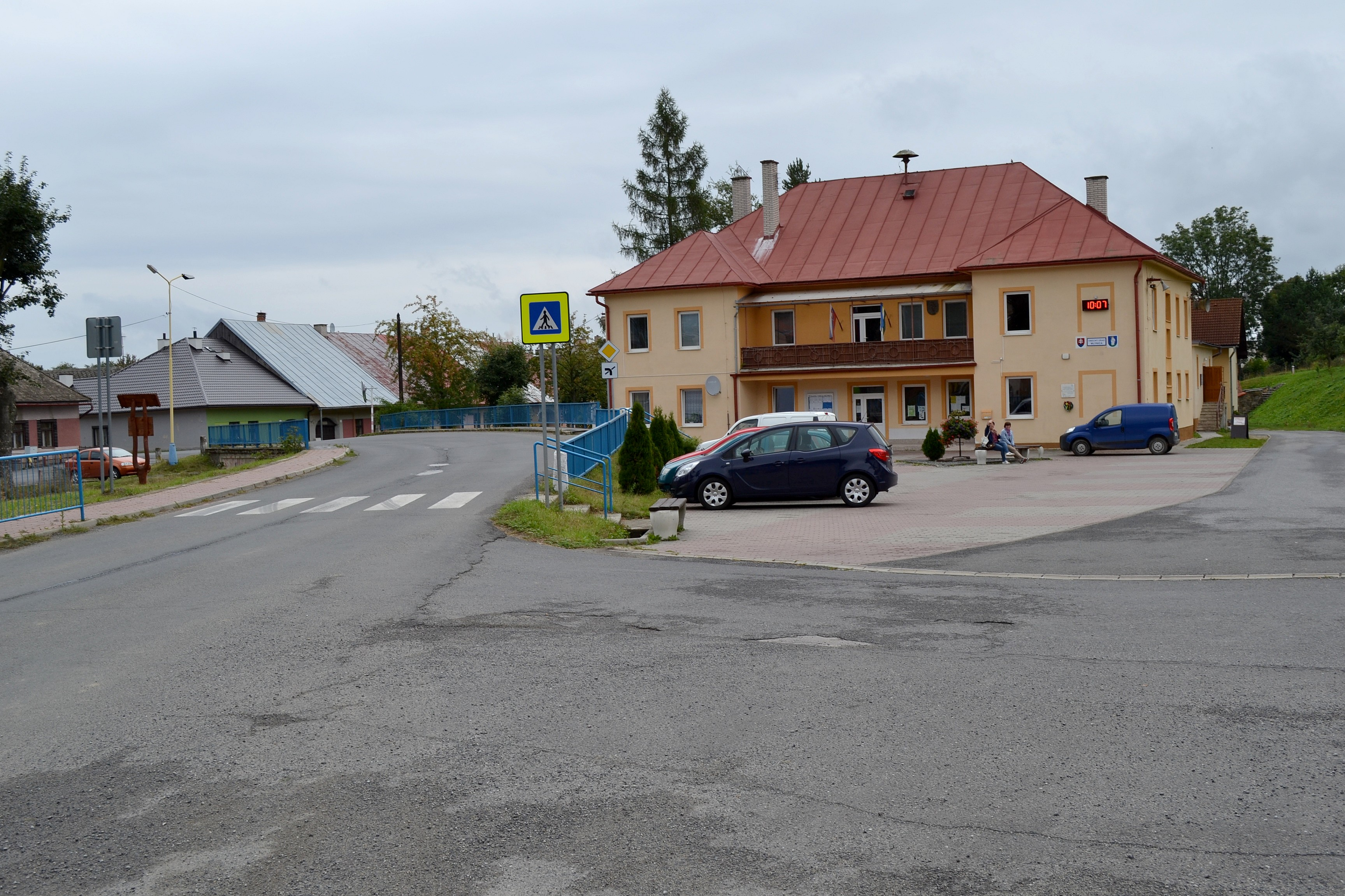 Mlynica (okr. Poprad), centrum obce s obecným úradom